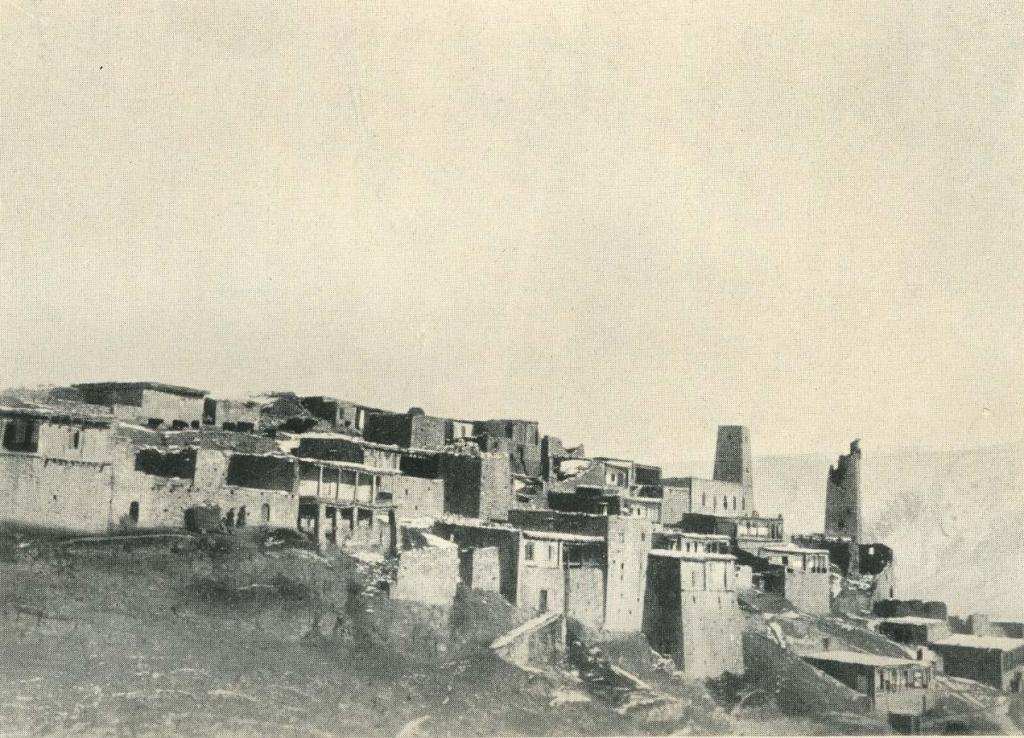 Аул Шарой (Чечня)